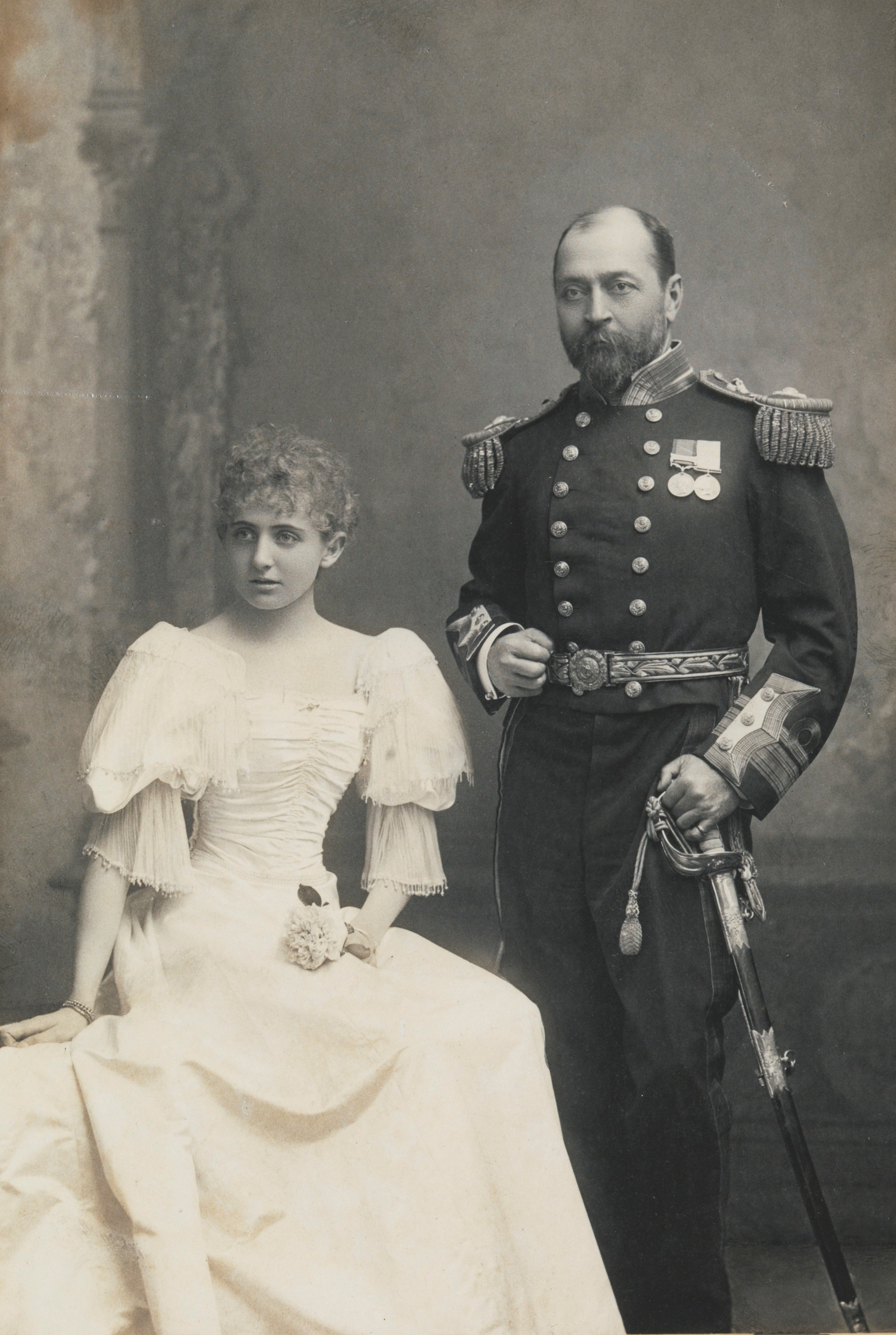 Lady Dora Markham og Sir Albert Hasting Markham. Med dedikasjon. Depicted person: Markham, Dora Depicted person: Markham, Albert Hasting (1841-1918) Depicted place: Storbritannia, London